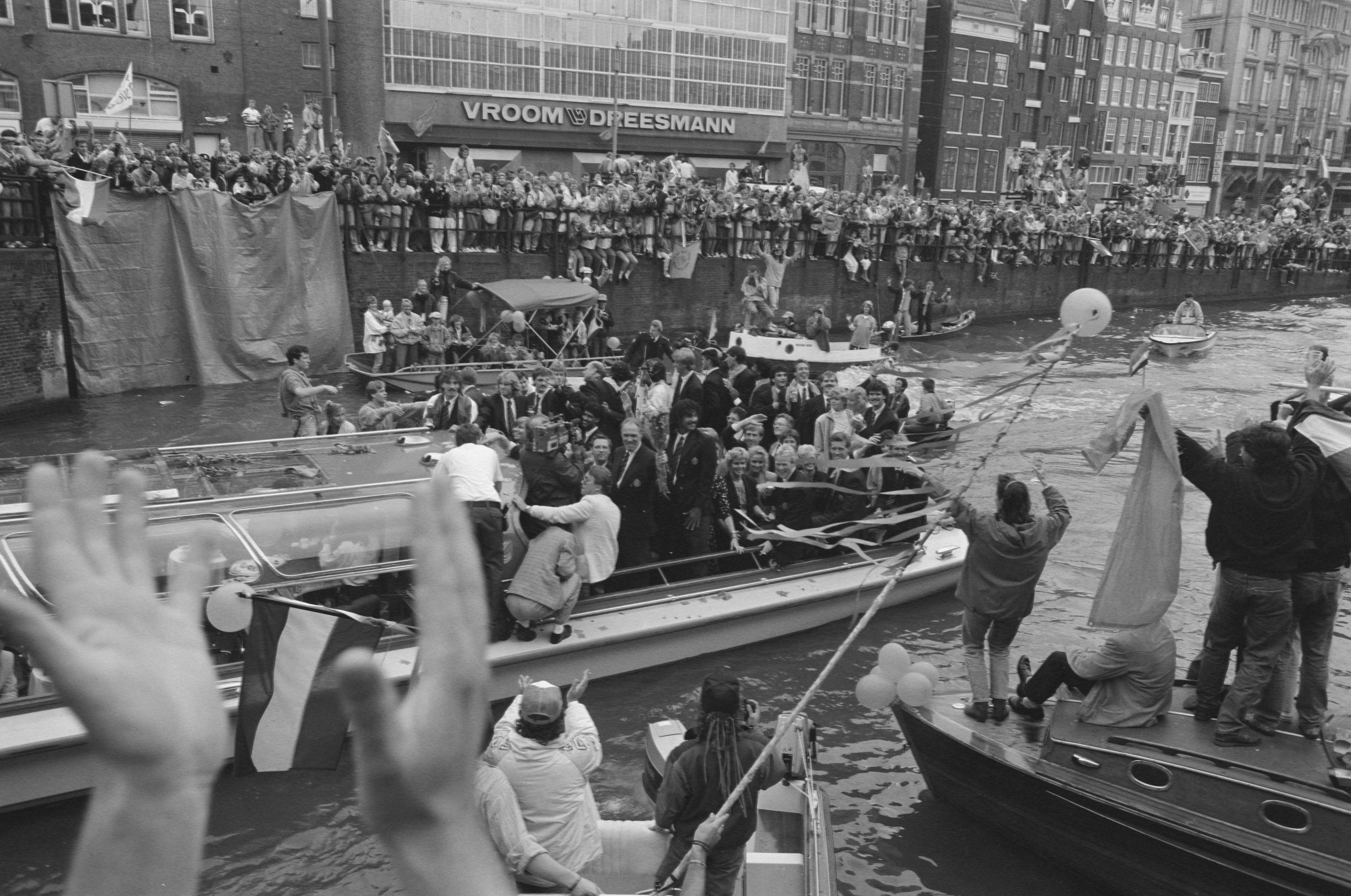 Collectie / Archief : Fotocollectie Anefo Reportage / Serie : [ onbekend ] Beschrijving : Huldiging Nederlands elftal na Europees kampioenschap 1988 te Munchen in Amsterdam; tocht door de grachten Datum : 26 juni 1988 Locatie : Amsterdam, München Trefwoorden : GRACHTEN, sport, voetbal Fotograaf : Croes, Rob C. / Anefo Auteursrechthebbende : Nationaal Archief Materiaalsoort : Negatief (zwart/wit) Nummer archiefinventaris : bekijk toegang 2.24.01.05 Bestanddeelnummer : 934-2743